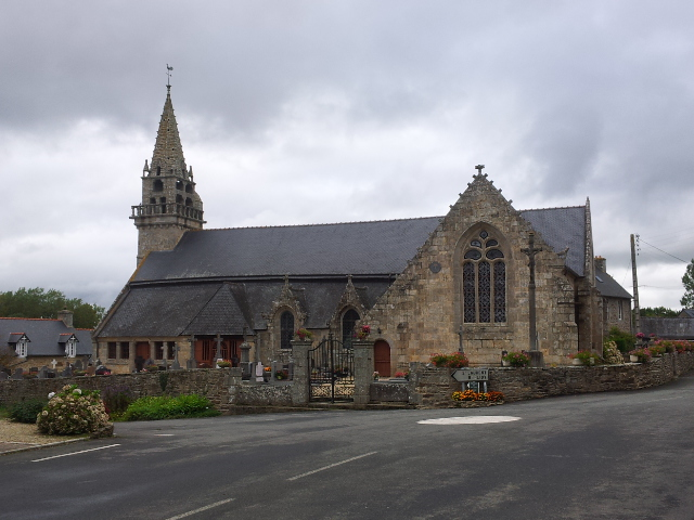 Église